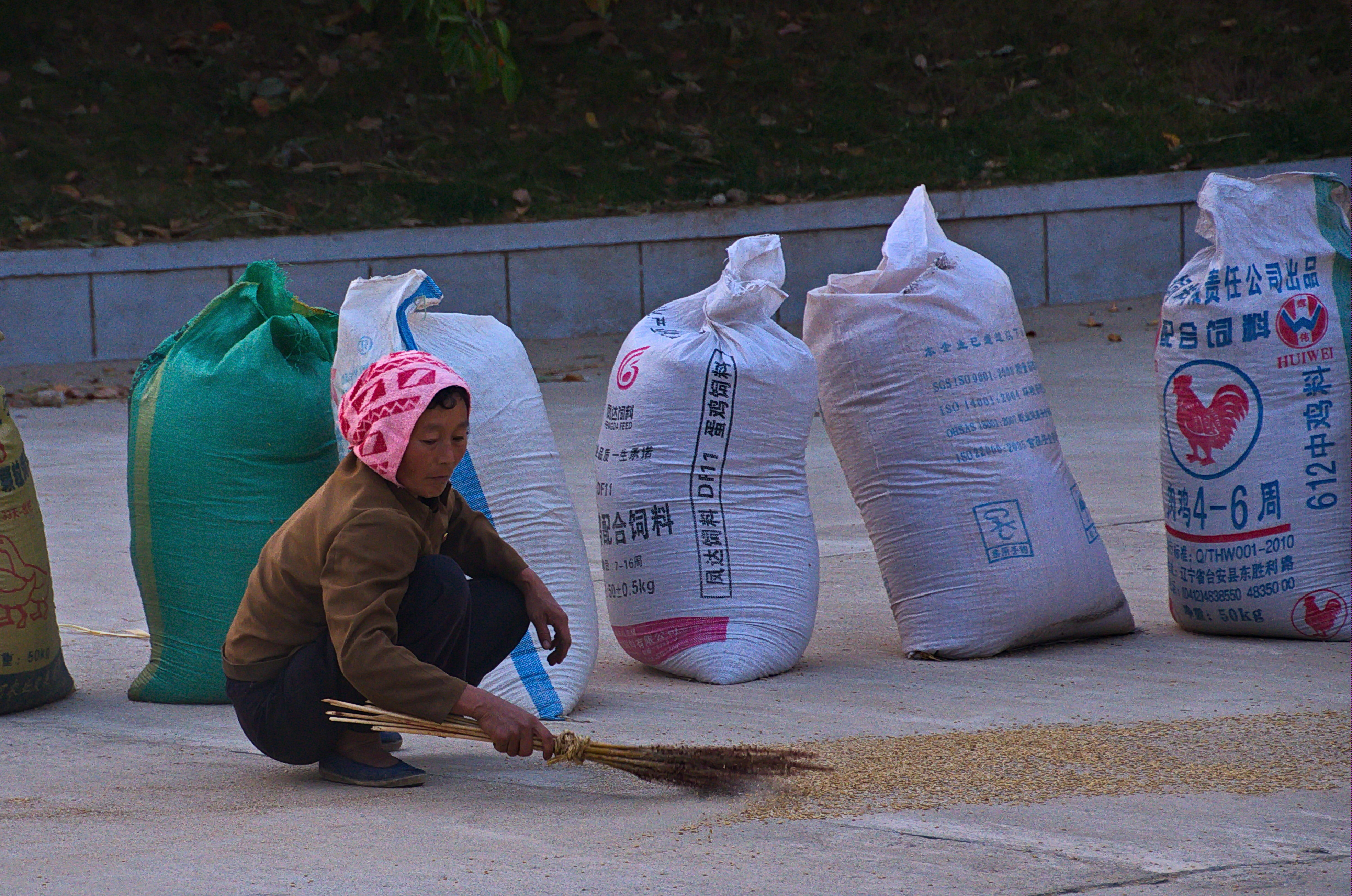 Nordkorea 2015 - landwirtschaftliche Kooperative Chonsam